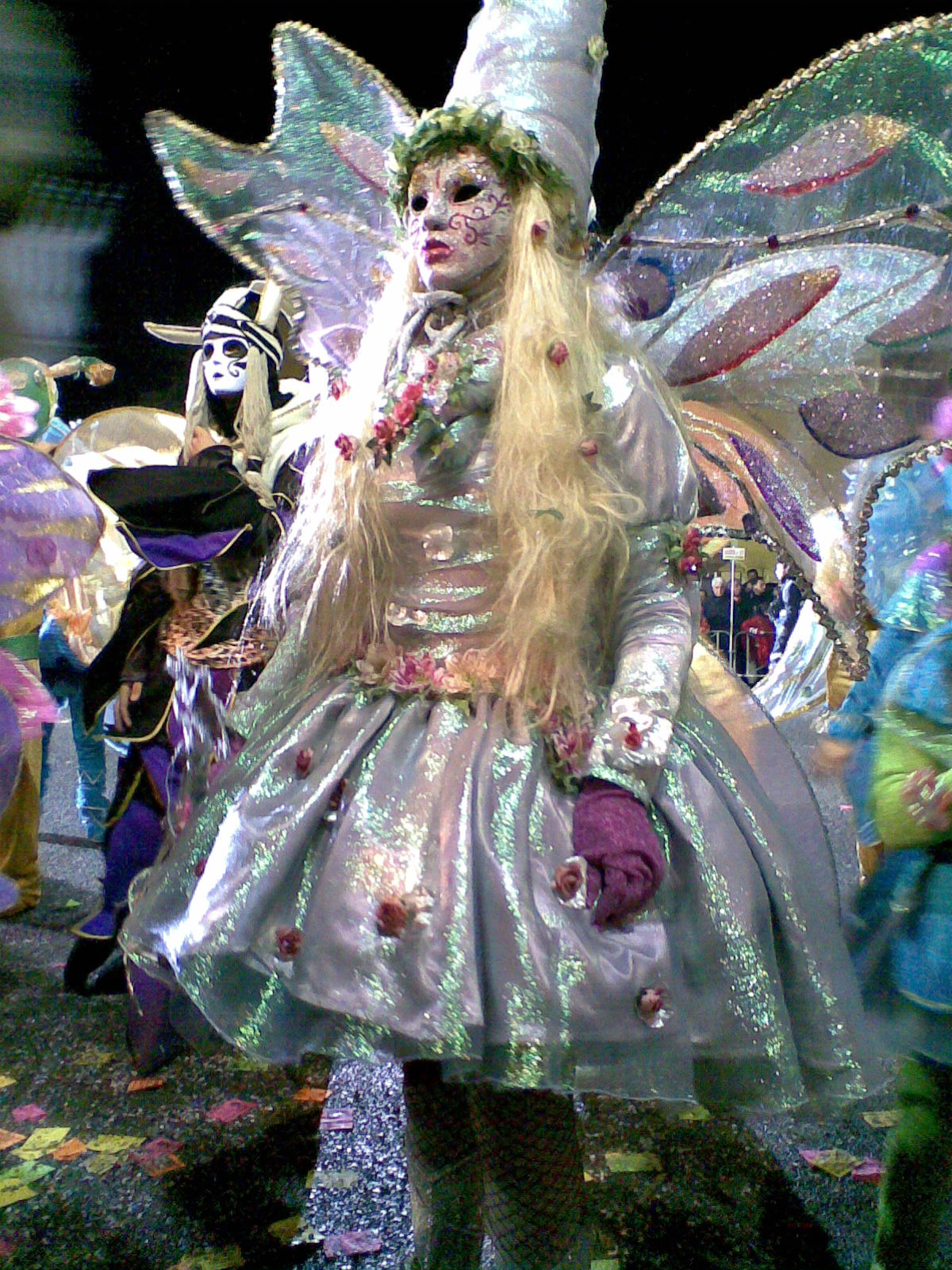 Gruppo in maschera durante il Carnevale 2008 a Castrovillari (CS) Italy , 39° 49' 5.68" N 16° 12' 19.03" E